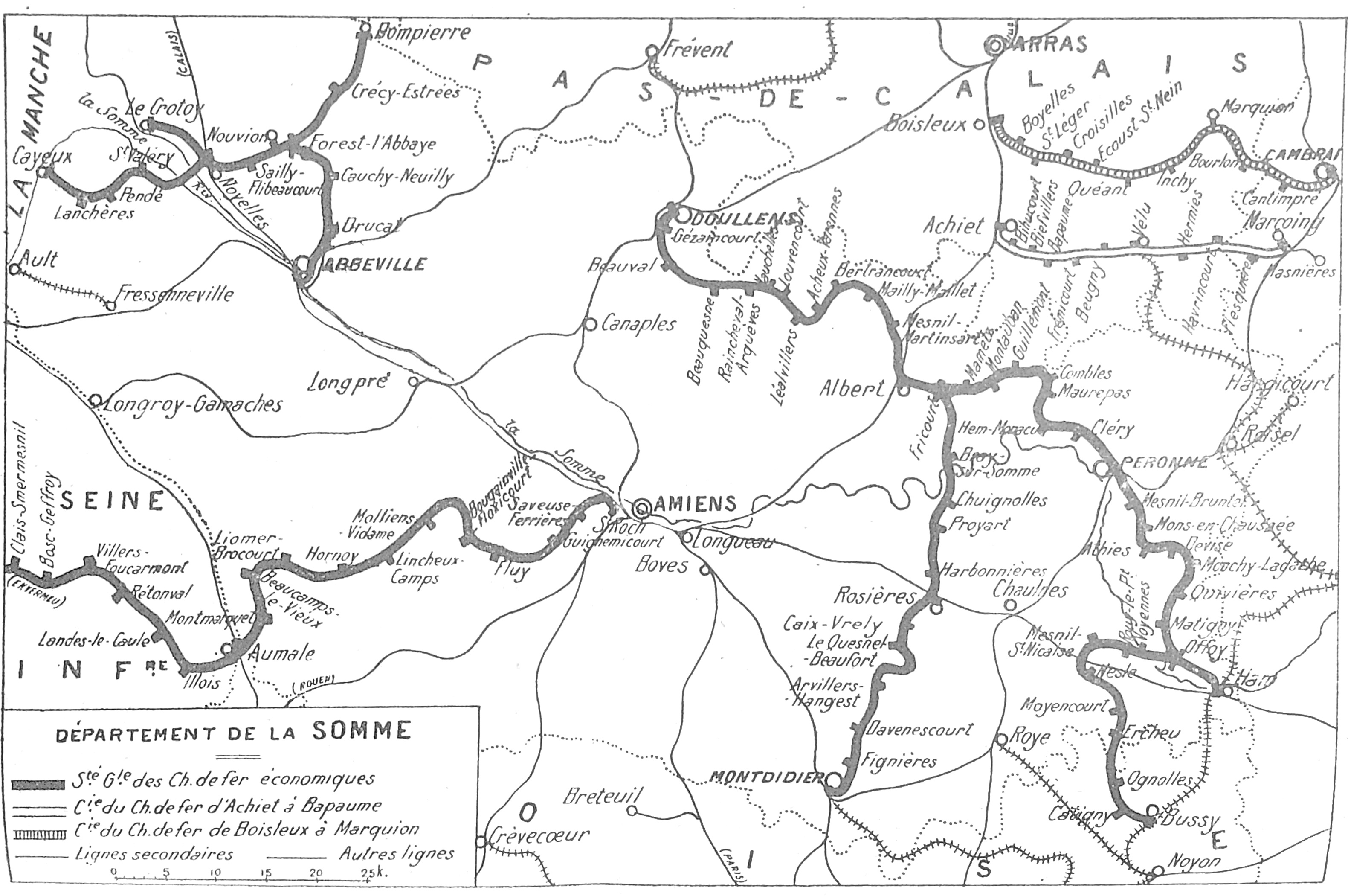 Plan du réseau départemental de chemins de fer secondaires du département de la Somme - 1928